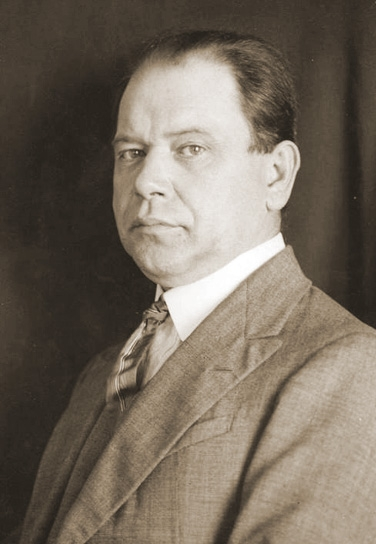 Władysław Skoczylas (1883—1934) - artysta malarz, grafik. Fotografia portretowa. 1928